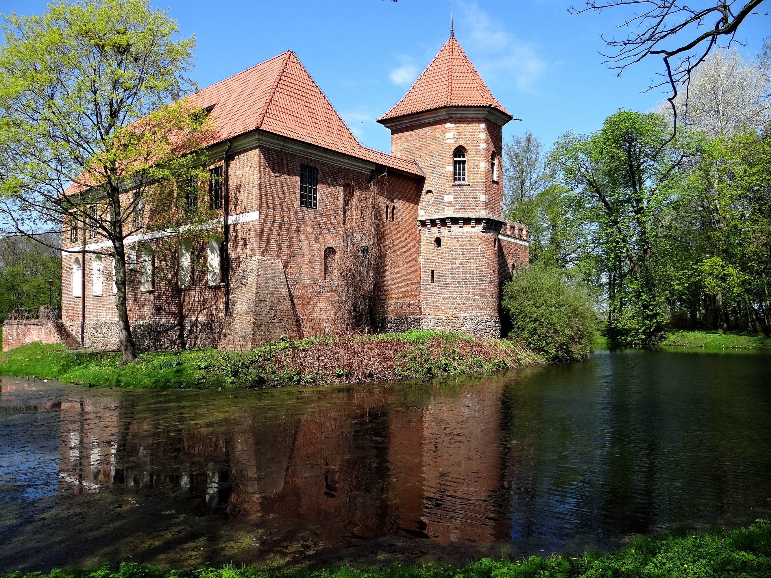 Oporów, zamek, 1434-1449, 1657, 1962-65